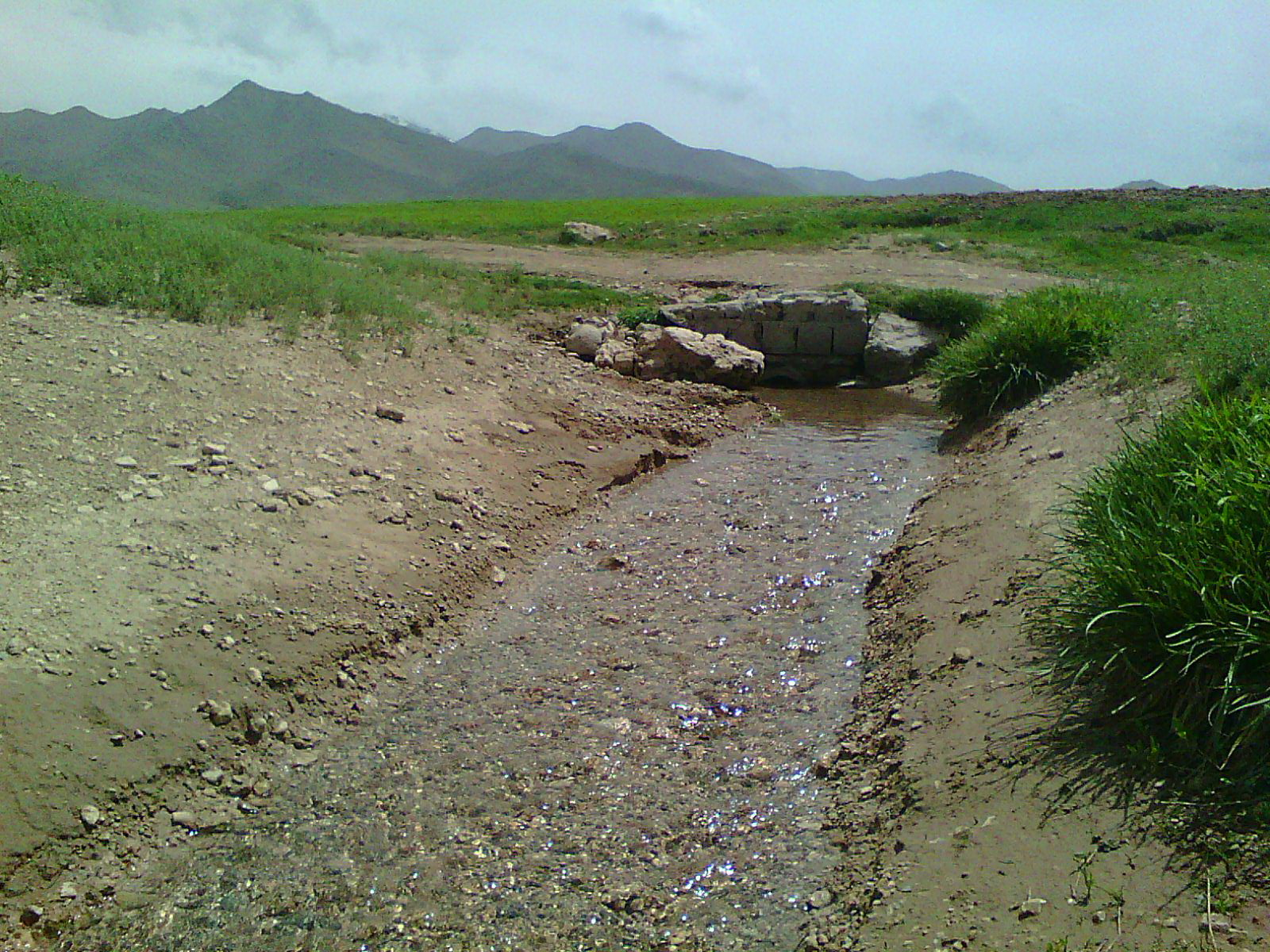 چشمه‌ای آب شیرین الوند